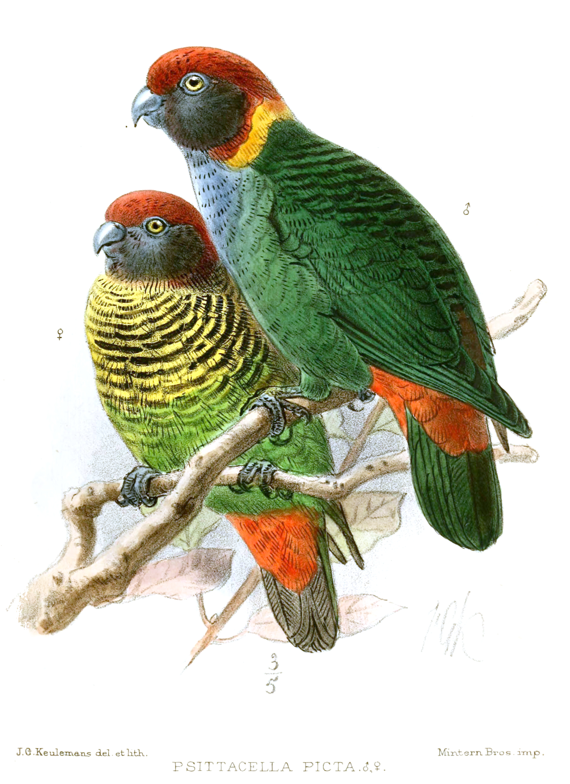 Psittacella picta